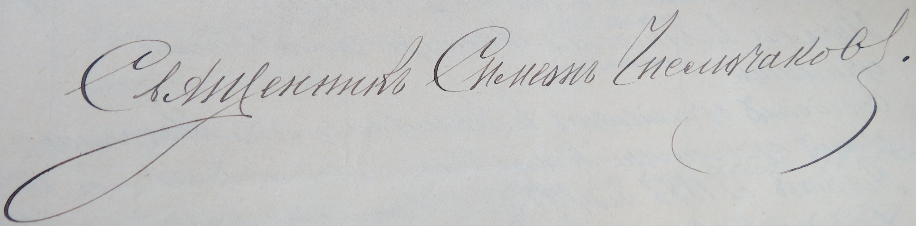 Подпись Семена Чисмочакова